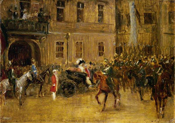 "Seine Hochfürstliche Durchlaucht der regierende Fürst Albert von Thurn und Taxis führt ihrer Kaiserlichen Hoheit Margarete Erzherzogin von Österreich den Einzug des Schwadronerregiments (von Dillingen nach Regensburg versetzt) vor gemalt am Tage des Einzuges 24.9.1909" (gemeint wohl das 2. Königlich Bayerische Chevaulegers-Regiment „Taxis“); Öl auf Karton, signiert, bezeichnet und datiert, 39 x 54 cm